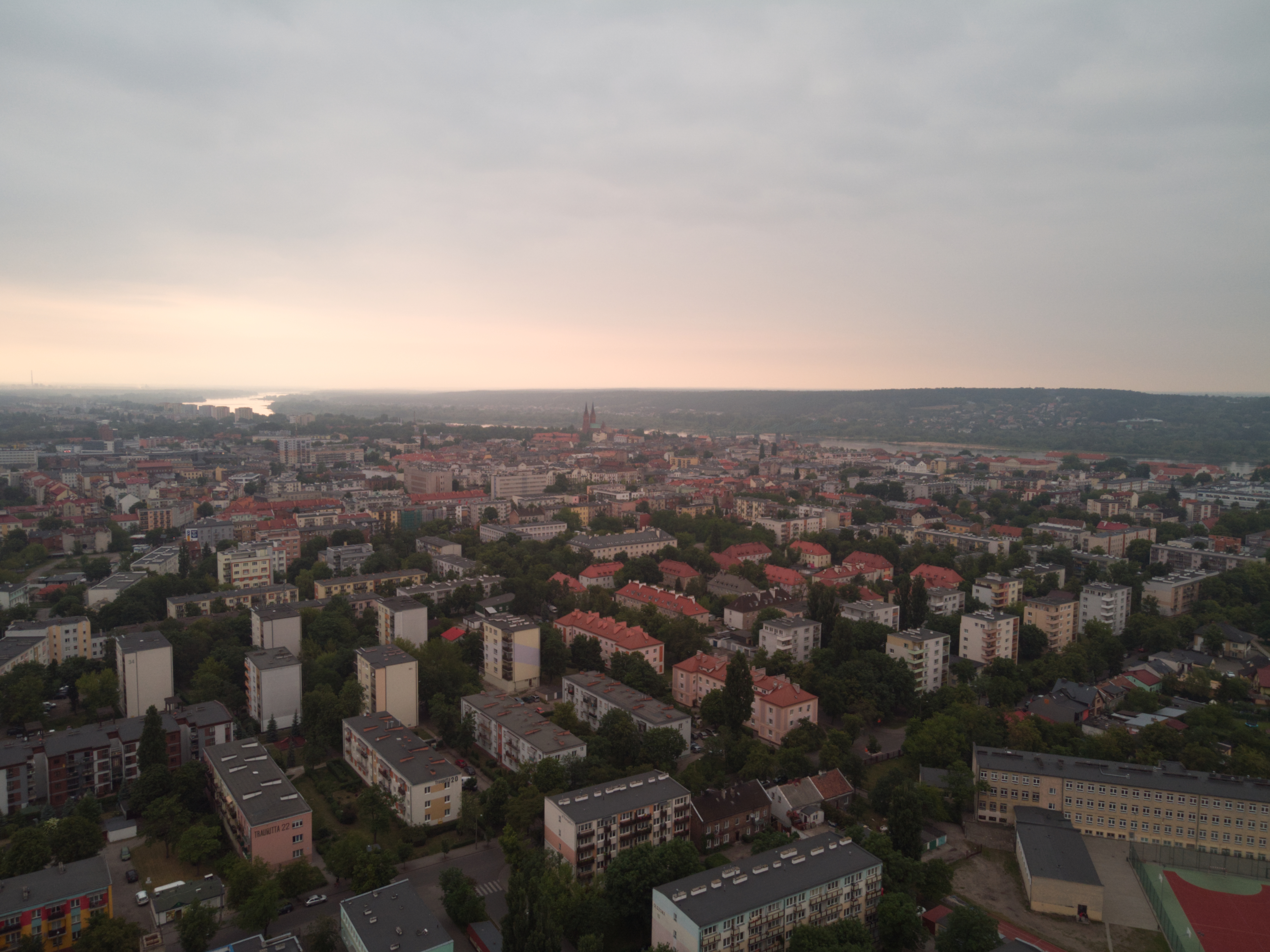 Śródmieście (2020 r.)